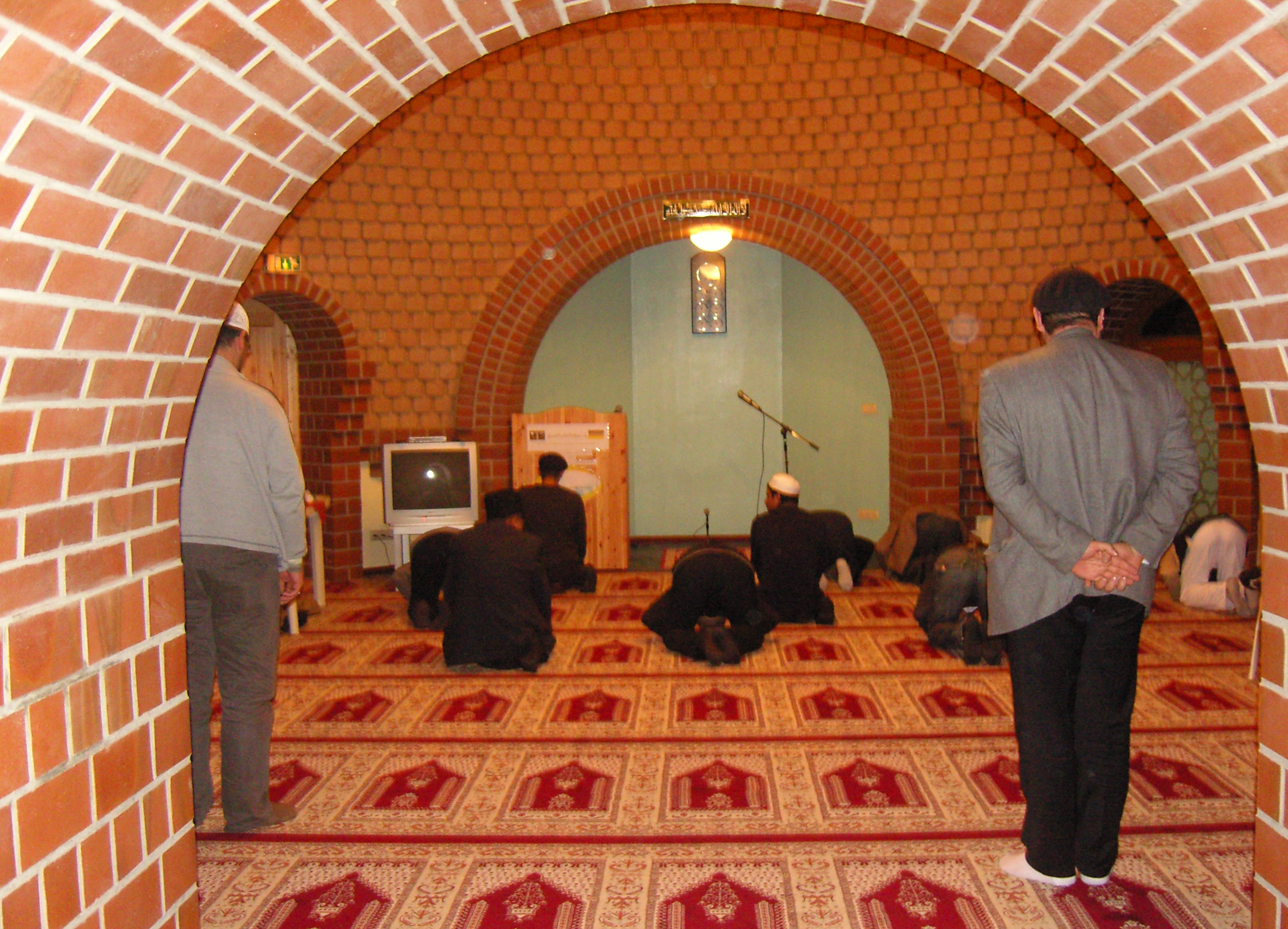 Ansicht eines Gebetsraums.